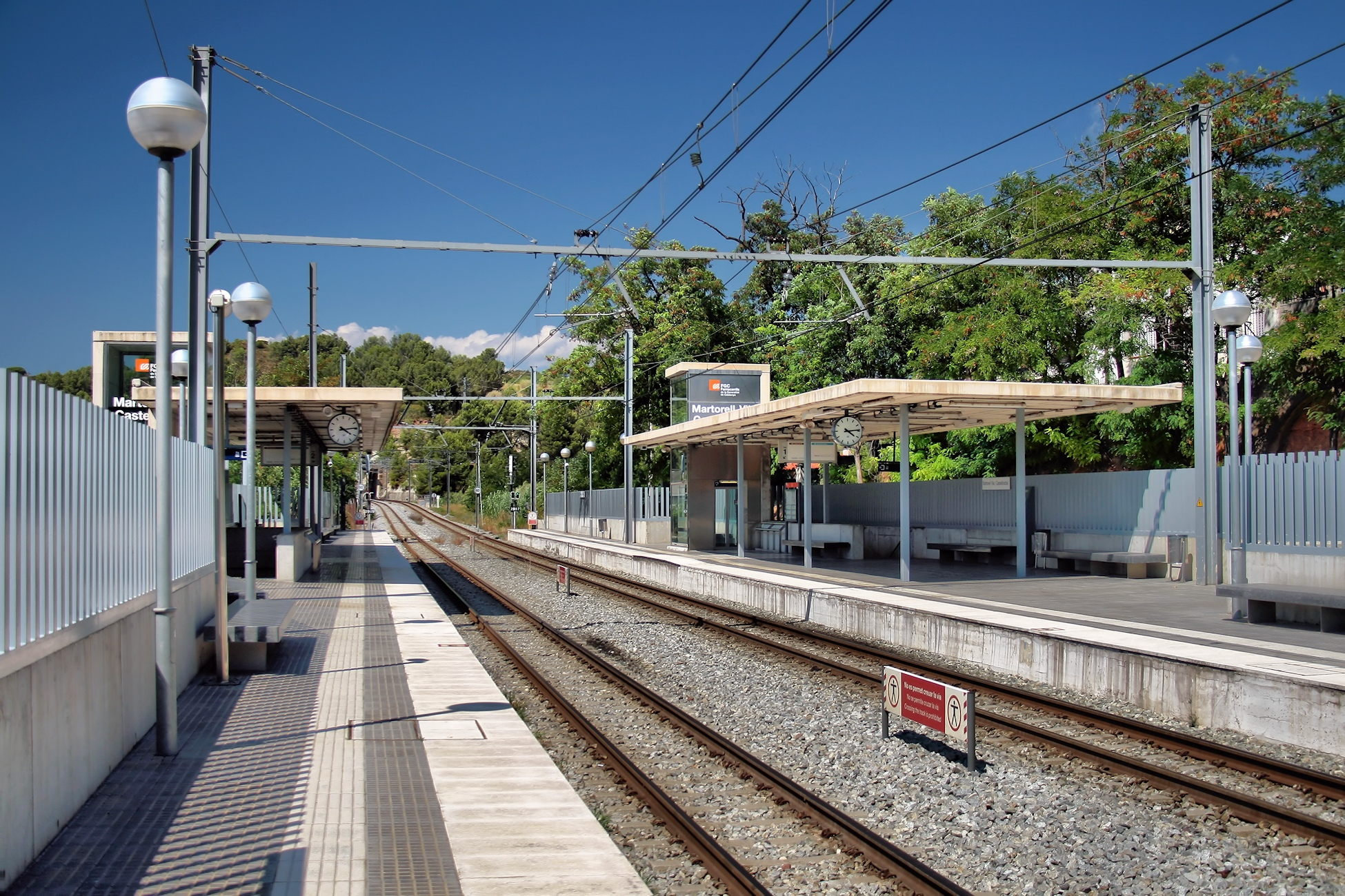 FGC Martorell Vila , Castellbisbal